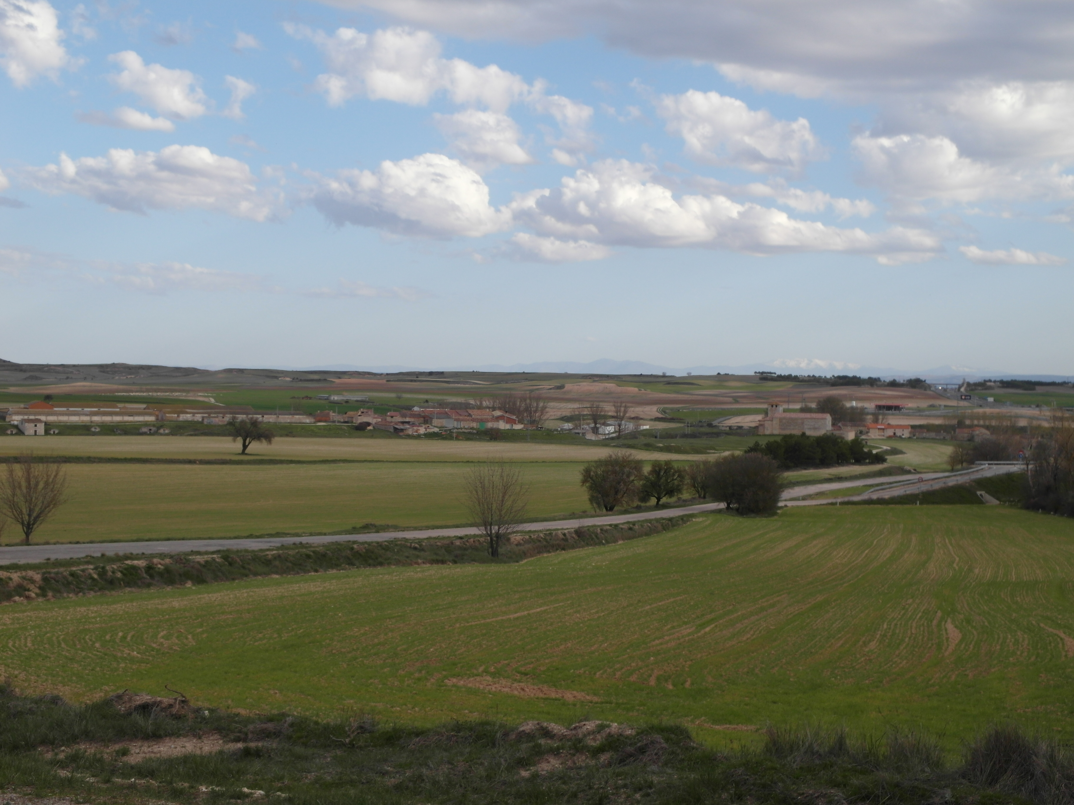 Oquillas, Burgos.